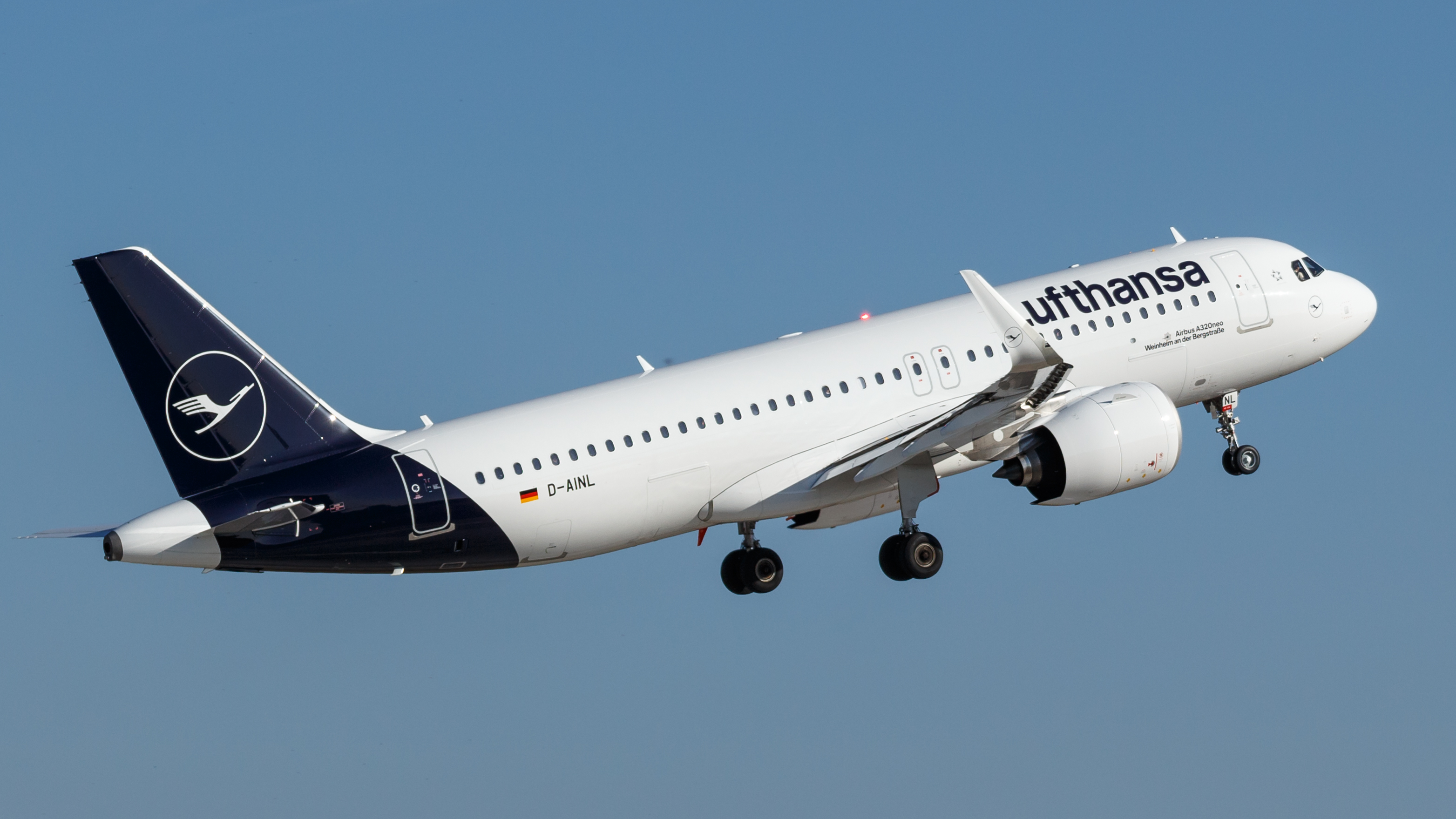 D-AINL Lufthansa A320neo Weinheim an der Bergstraße.jpg